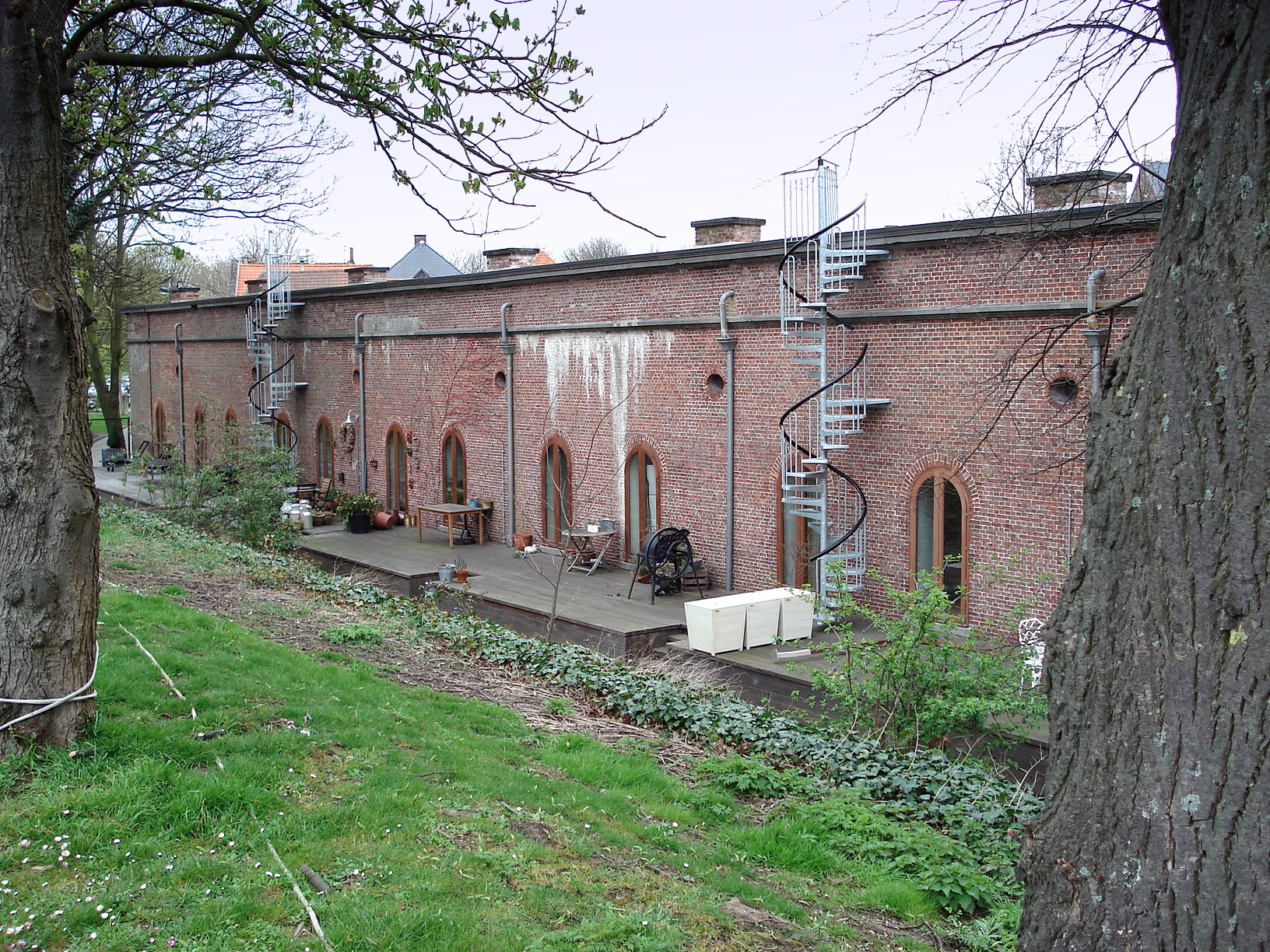 Lillo-Fort, kazerne (1802), omgevormd tot appartementen